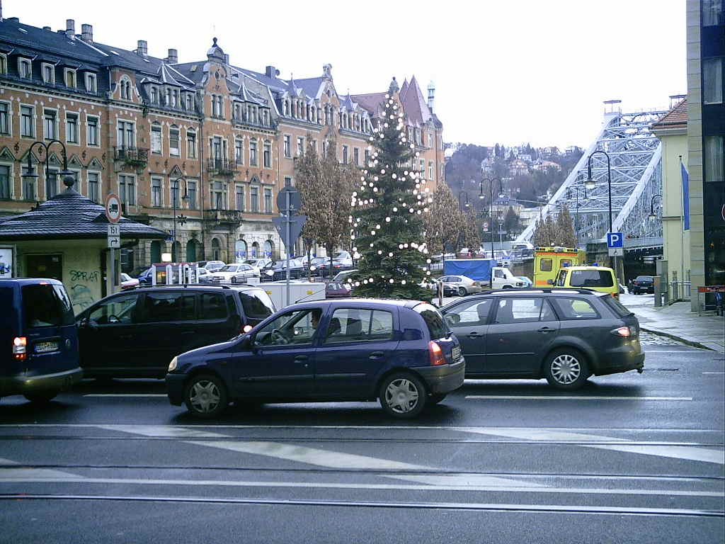 Schillerplatz, Dresden, Saxony, Germany